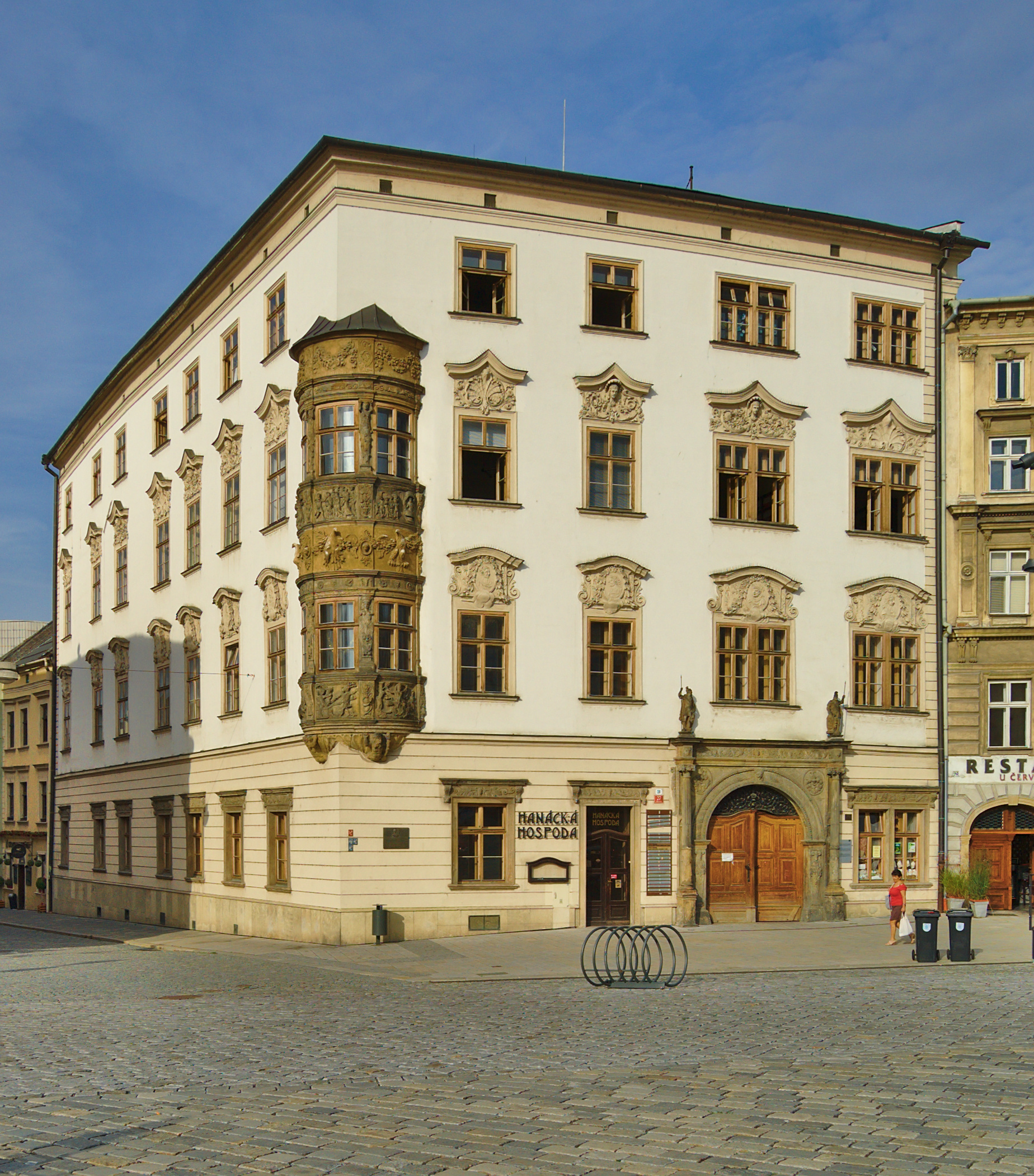 Hauenschildův palác, čp. 27, Dolní náměstí, Olomouc